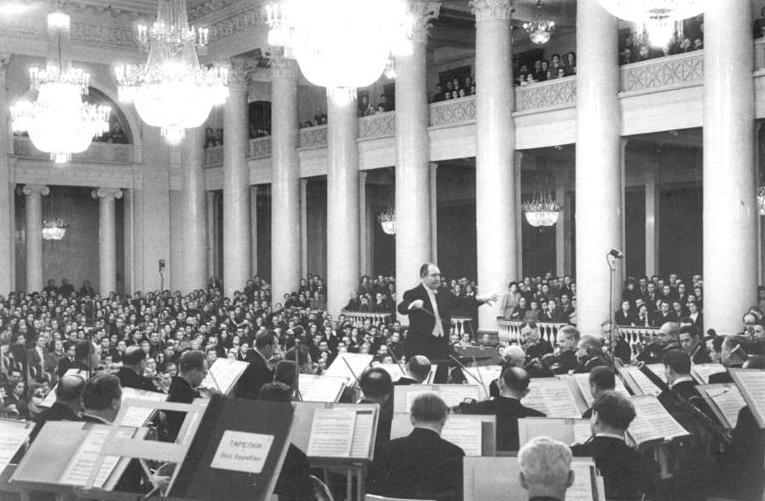 Zentralbild-XIII Pu-Wi. 4.1.1954 Dezember 1954 Ein Konzert des Sinfonieorchesters der Leningrader Philharmonie unter Leitung von Nationalpreisträger Professor Franz Konwitschny (Deutsche Demokratische Republik) fand im Großen Saal der Leningrader Philharmonie statt. UBz: Franz Konwitschny dirigierte das Sinfonieorchester.